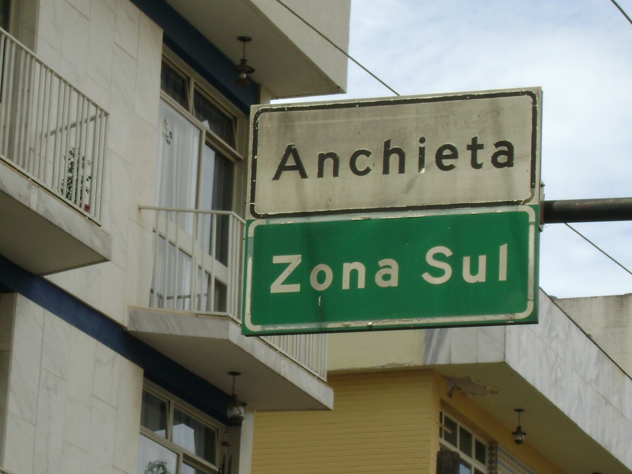 Bairro Anchieta